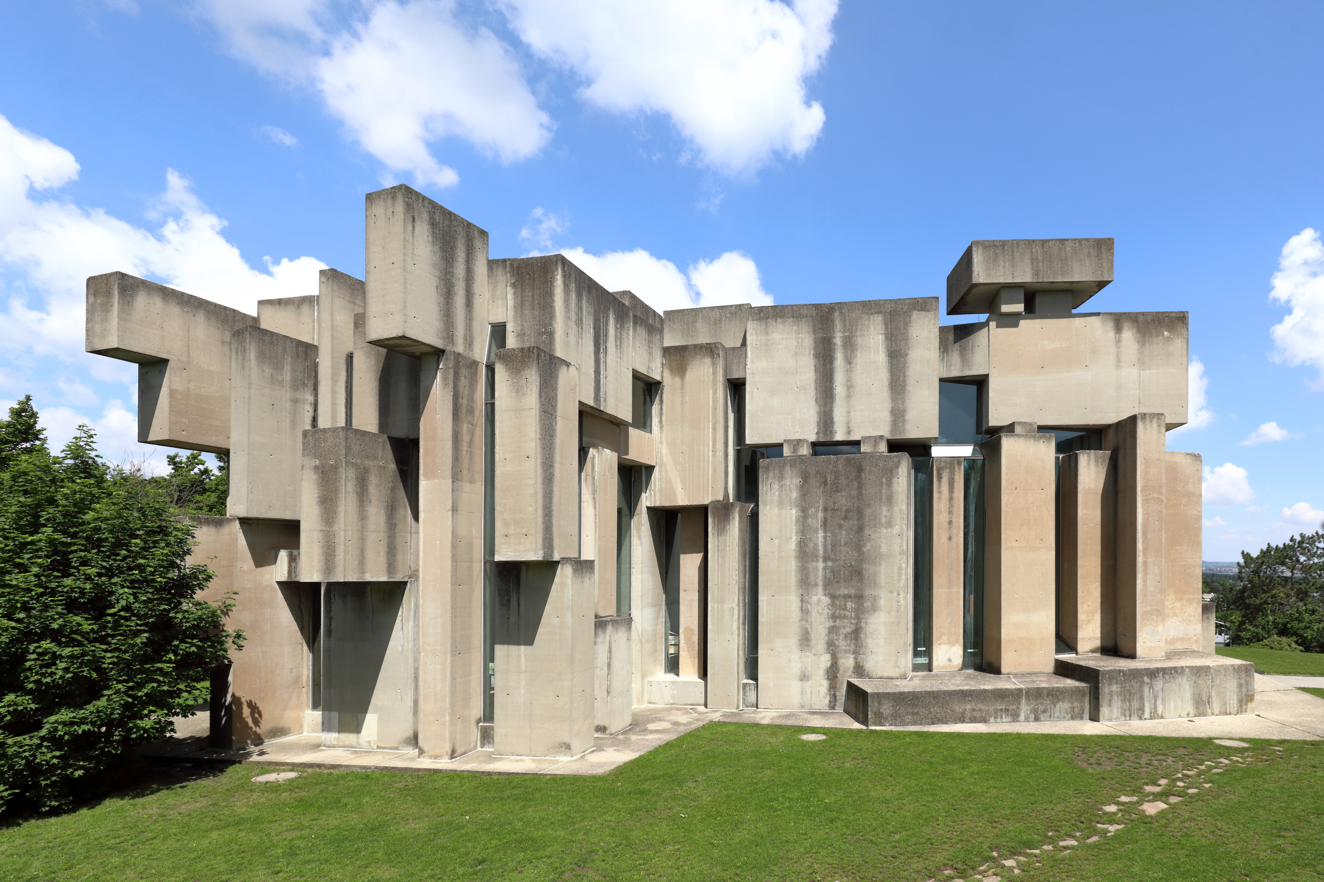 Südsüdostansicht der Wotruba- bzw. Dreifaltigkeitskirche auf dem Georgenberg im Wiener Stadtteil Mauer des 23. Gemeindebezirkes Liesing.Die Kirche im Stil des Brutalismus wurde auf Initiative von Margarethe Ottillinger (1919–1992) und nach einer Idee des Künstlers Fritz Wotruba (1907–1975) vom Architekten Fritz Gerhard Mayr (* 1931) errichtet. Der Entwurf für die Kirche (152 Betonblöcke mit einen Gesamtgewicht von über 4000 Tonnen, ohne Symmetrie aufeinander geschachtelt, mit schmalen, verschieden hohen Fensteröffnungen) wurde von Wotruba 1964 präsentiert. Wegen großem Widerstand konnte man erst 1974 mit dem Bau beginnen und zwei Jahre später, am 24. Oktober 1976, erfolgte die feierliche Einweihung durch Kardinal Franz König.